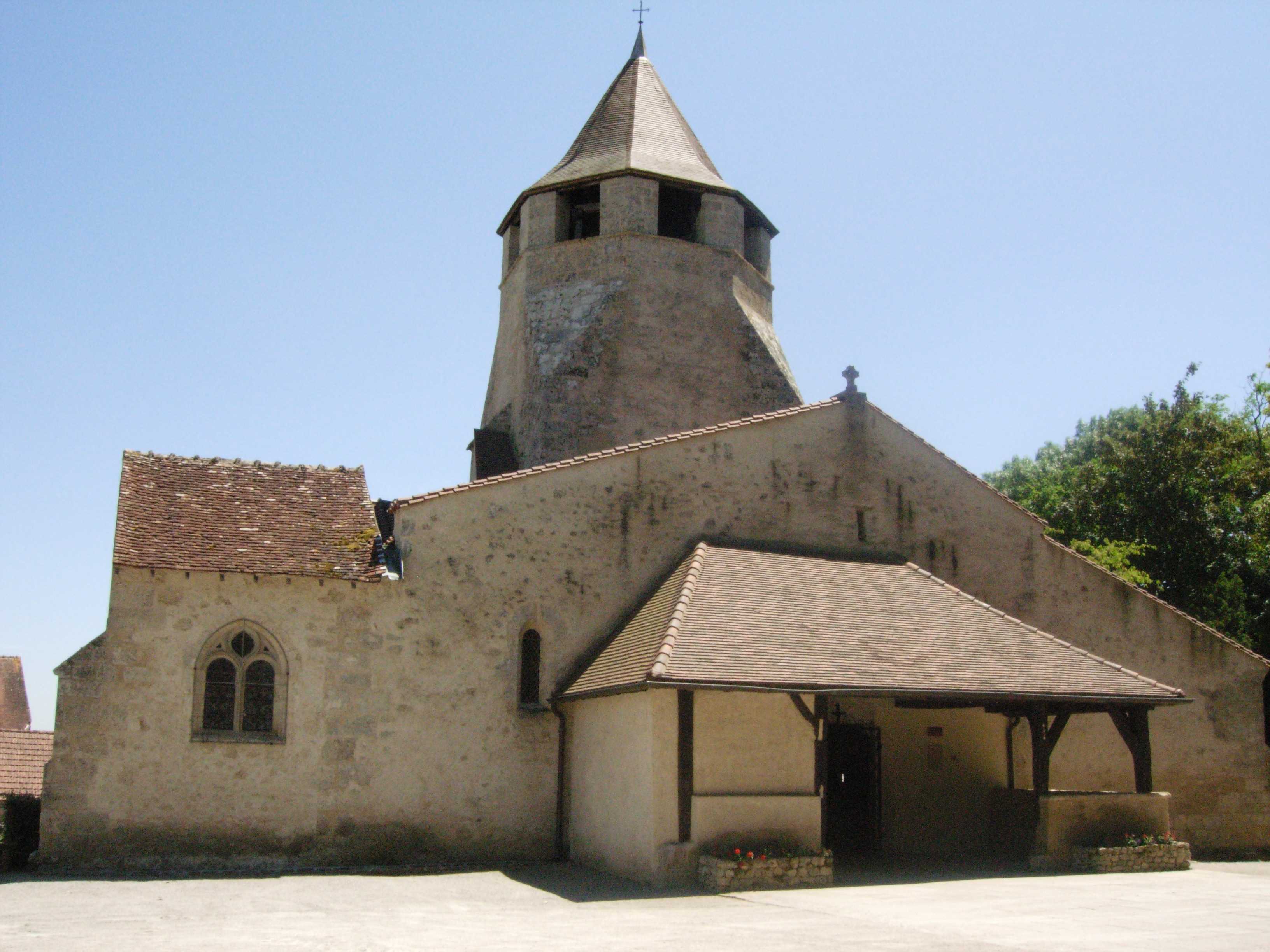 Photo de l'église de Louchy-montfand